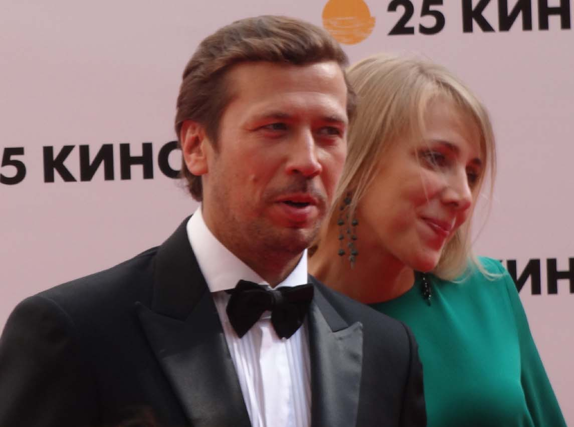 Андрей Мерзликин на церемонии открытия фестиваля "Кинотавр - 2014" в Сочи.